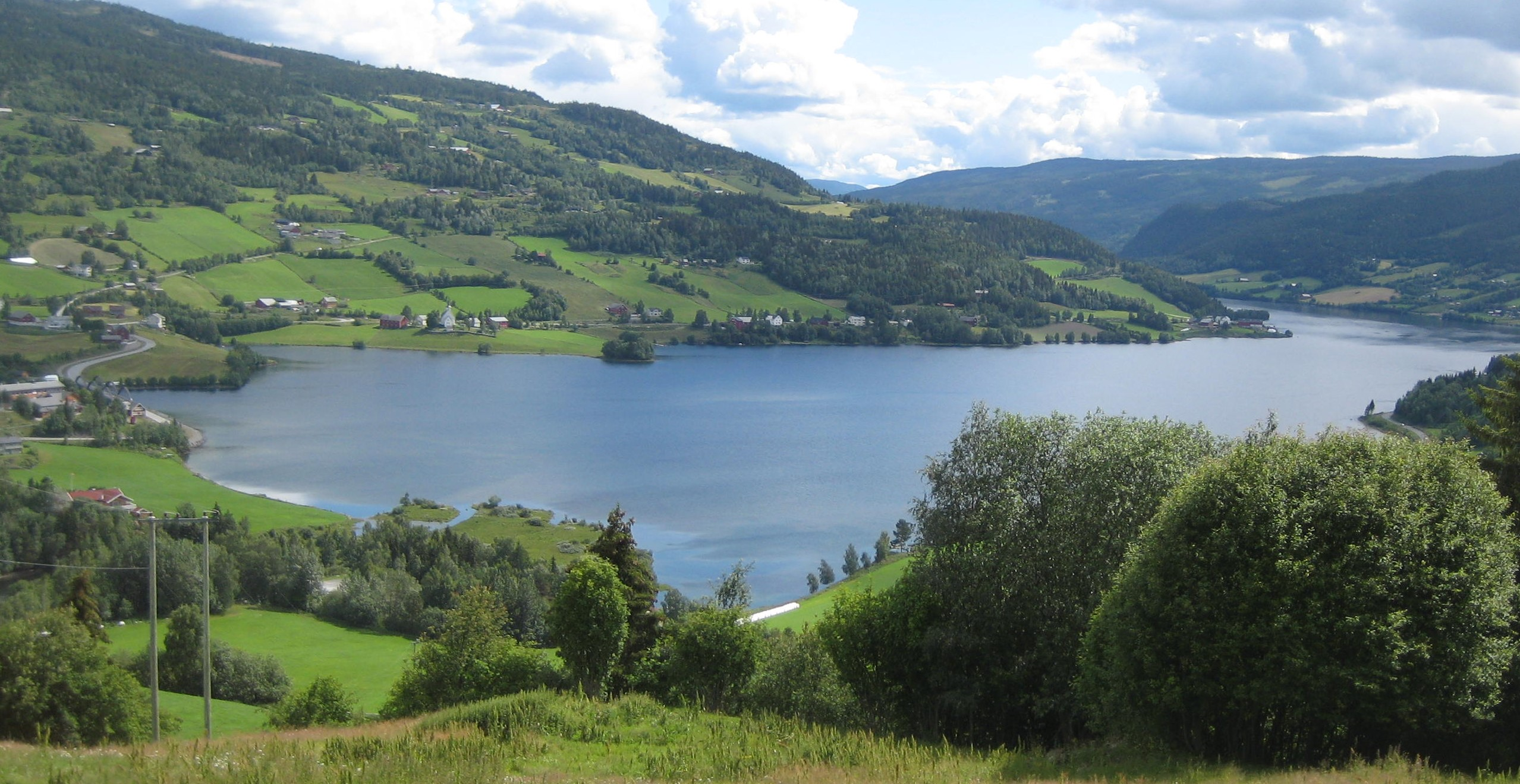 Strondafjorden sett fra vest